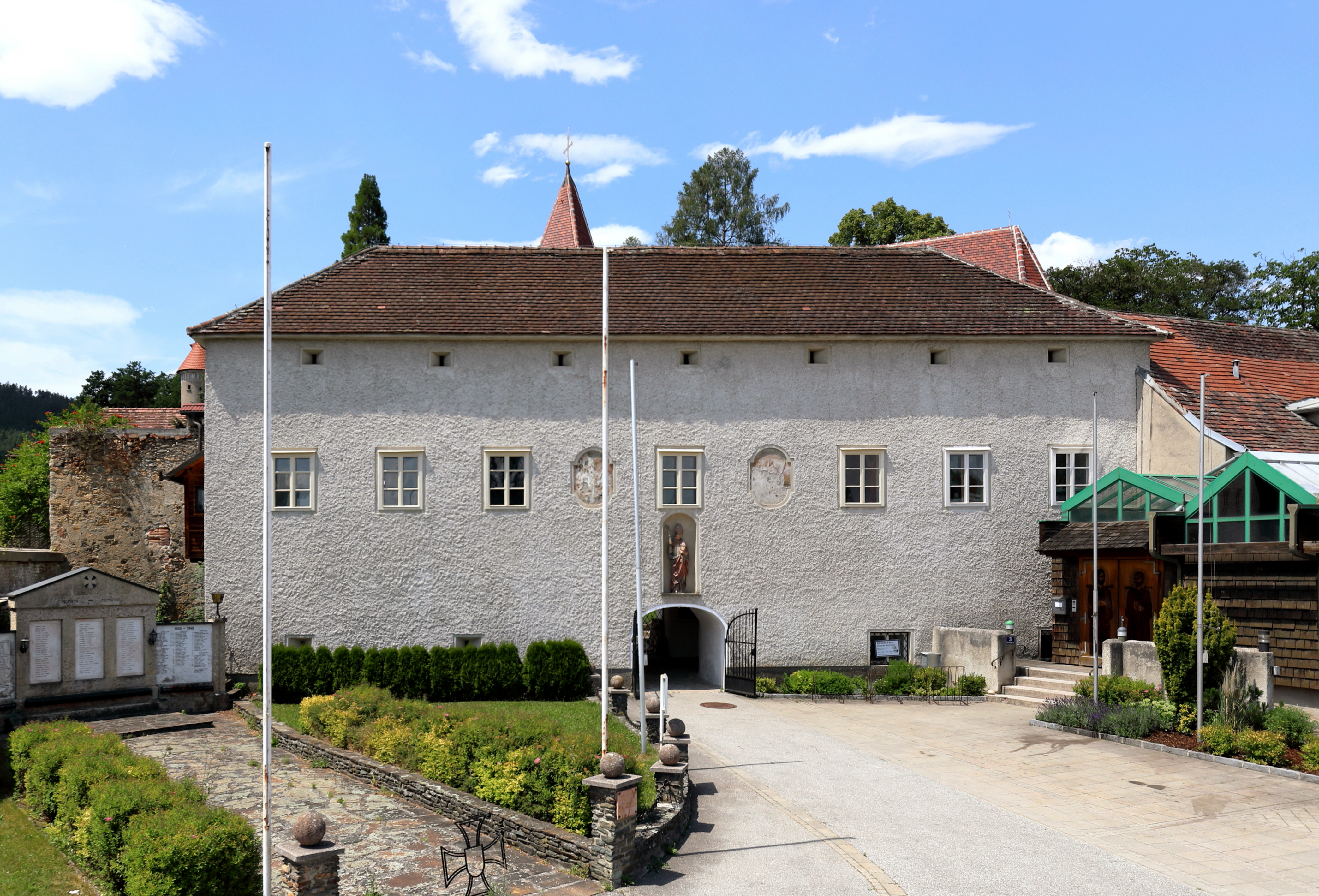 Südostansicht des Pfarrhofes von Pottschach, ein Ortsteil der niederösterreichischen Stadtgemeinde Ternitz.Ein mächtiger zweigeschossiger Bau mit Walmdach und Wehrgeschoss. Über der korbbogigen Durchfahrt befindet sich eine Rundbogennische mit der Figur des hl. Dionysius.